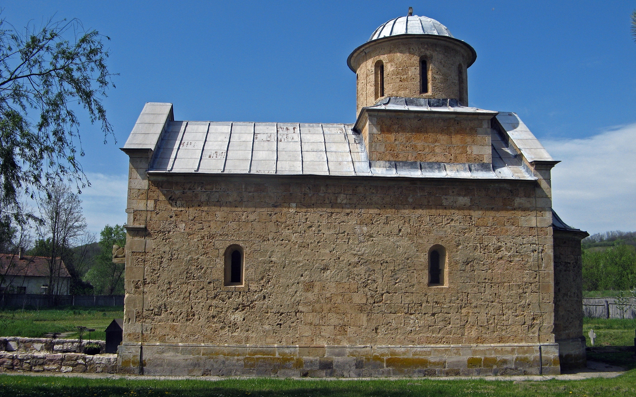 Trška crkva, Milatovac, Žagubica